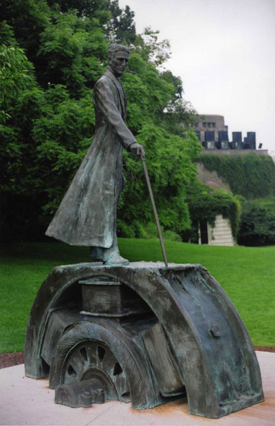 Teslova socha u Niagárských vodopádů.